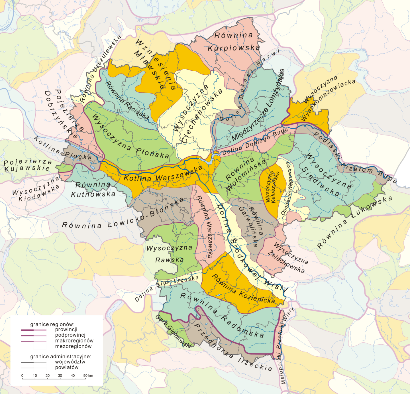 Mapa przedstawiająca mezoregiony fizycznogeograficzne województwa mazowieckiego